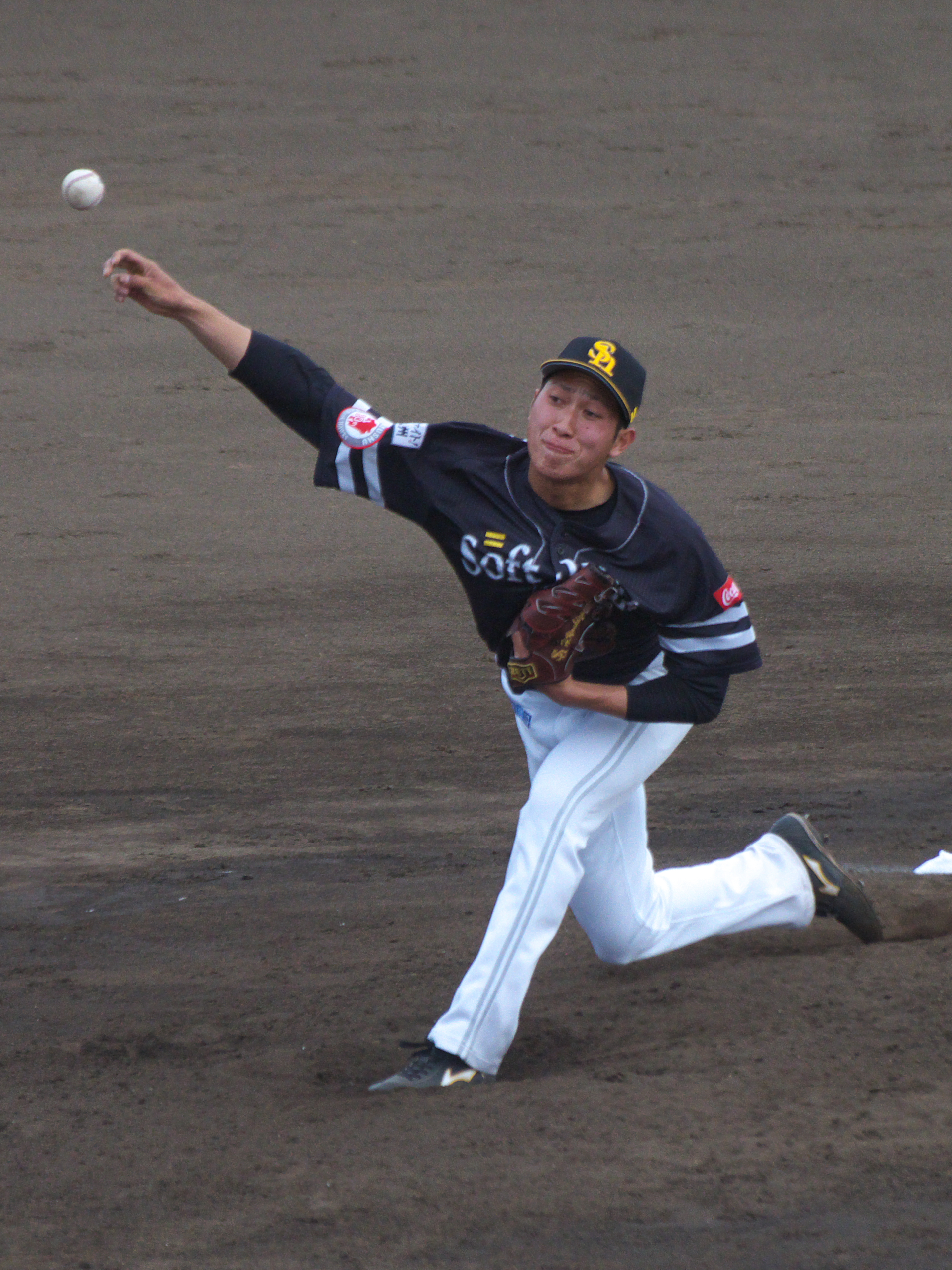 福岡ソフトバンクホークス吉住晴斗